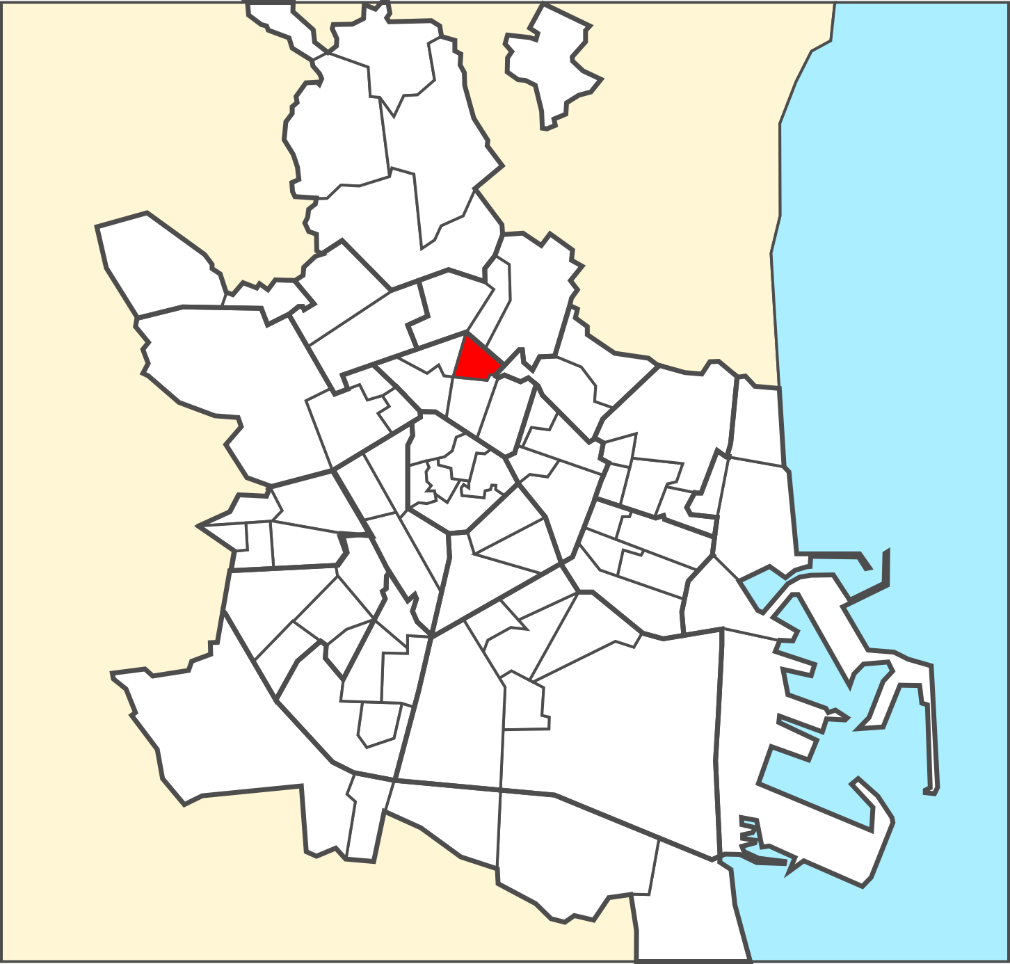 Localització del barri dins de la ciutat de València.